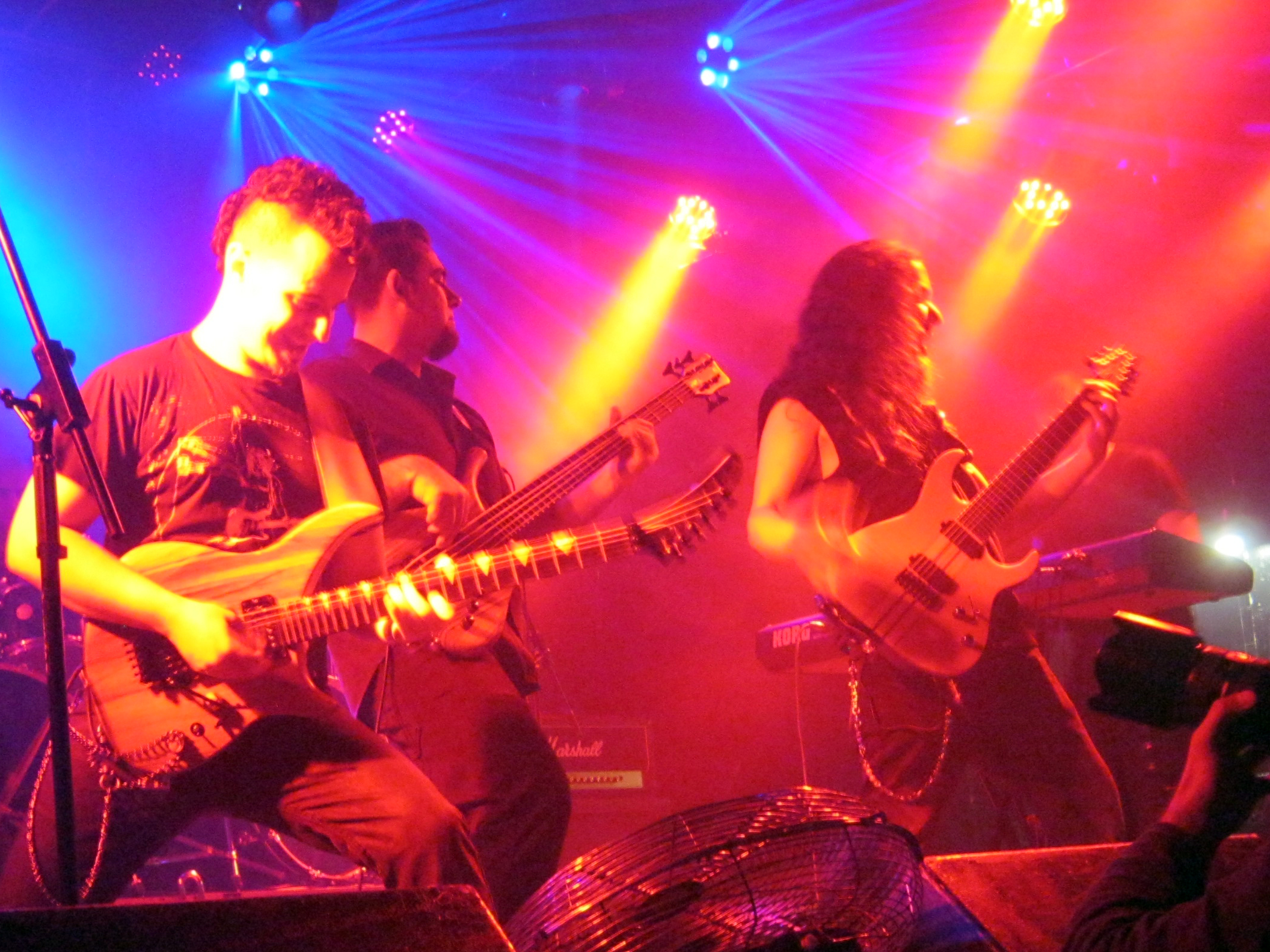 Orpheus Blade